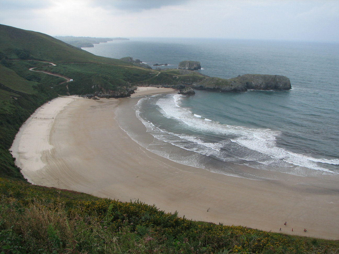 Playa de Torimbia en Niembro (Asturias)